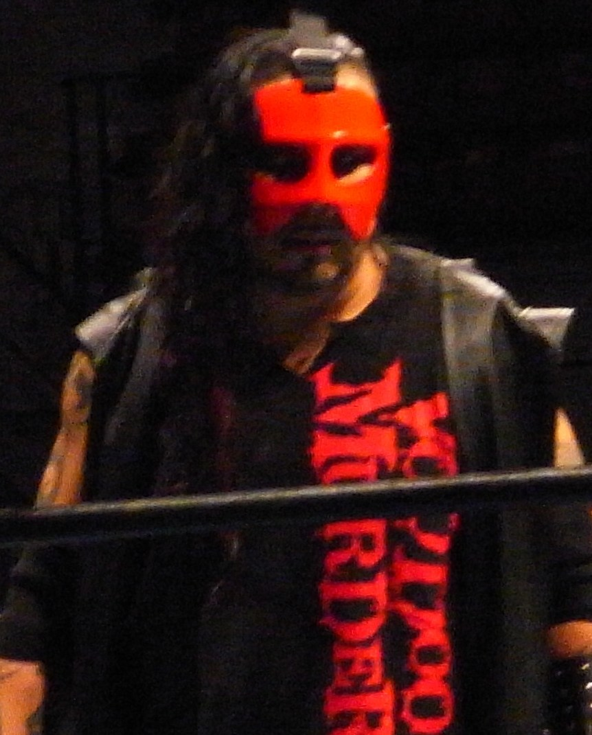 TARU